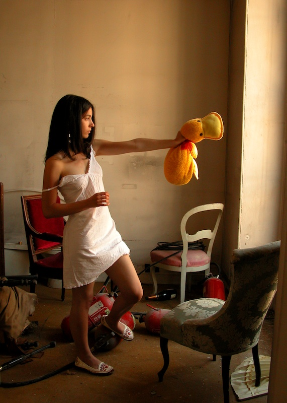 Photographie réalisée par l'artiste Achot Achot.